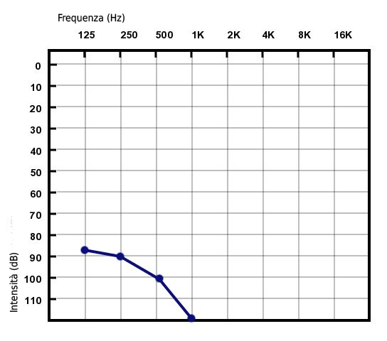 Audiogram przedstawiający progi słyszenia w przypadku głębokiego niedosłuchu o typie odbiorczym